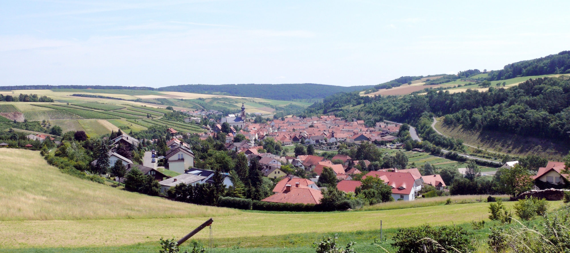 Königheim, Baden-Württemberg, Germany